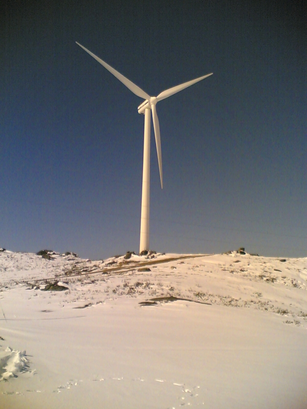 Parque eólico do Barroso depois de um nevão, próximo de Salto, Portugal - 18 MW